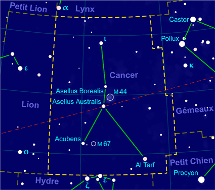 Carte pour la constellation Cancer Produite à l'aide du logiciel PP3